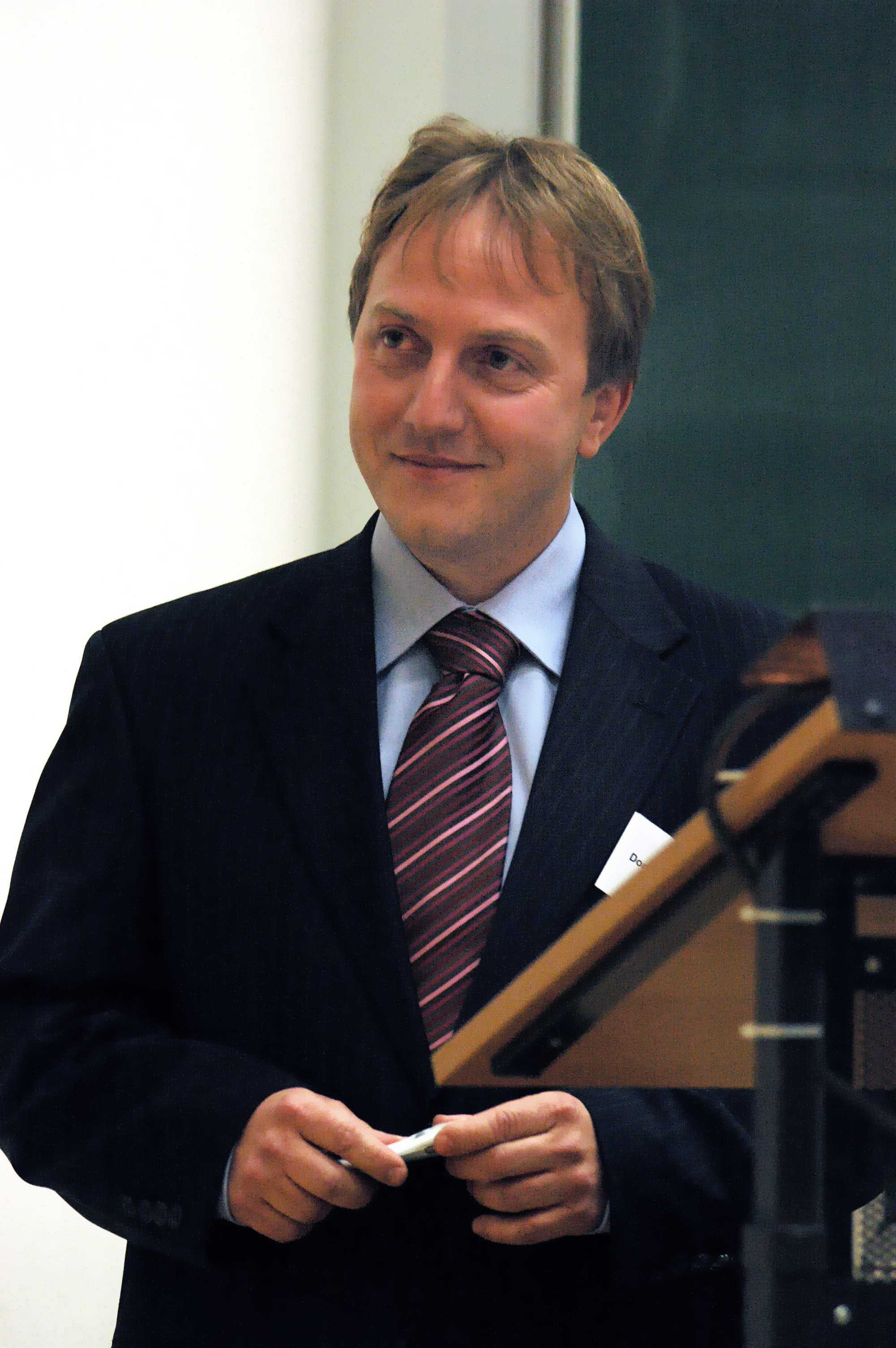 Der Naturwissenschaftler und Experimental-Archäologe Dr. Dominique Görlitz